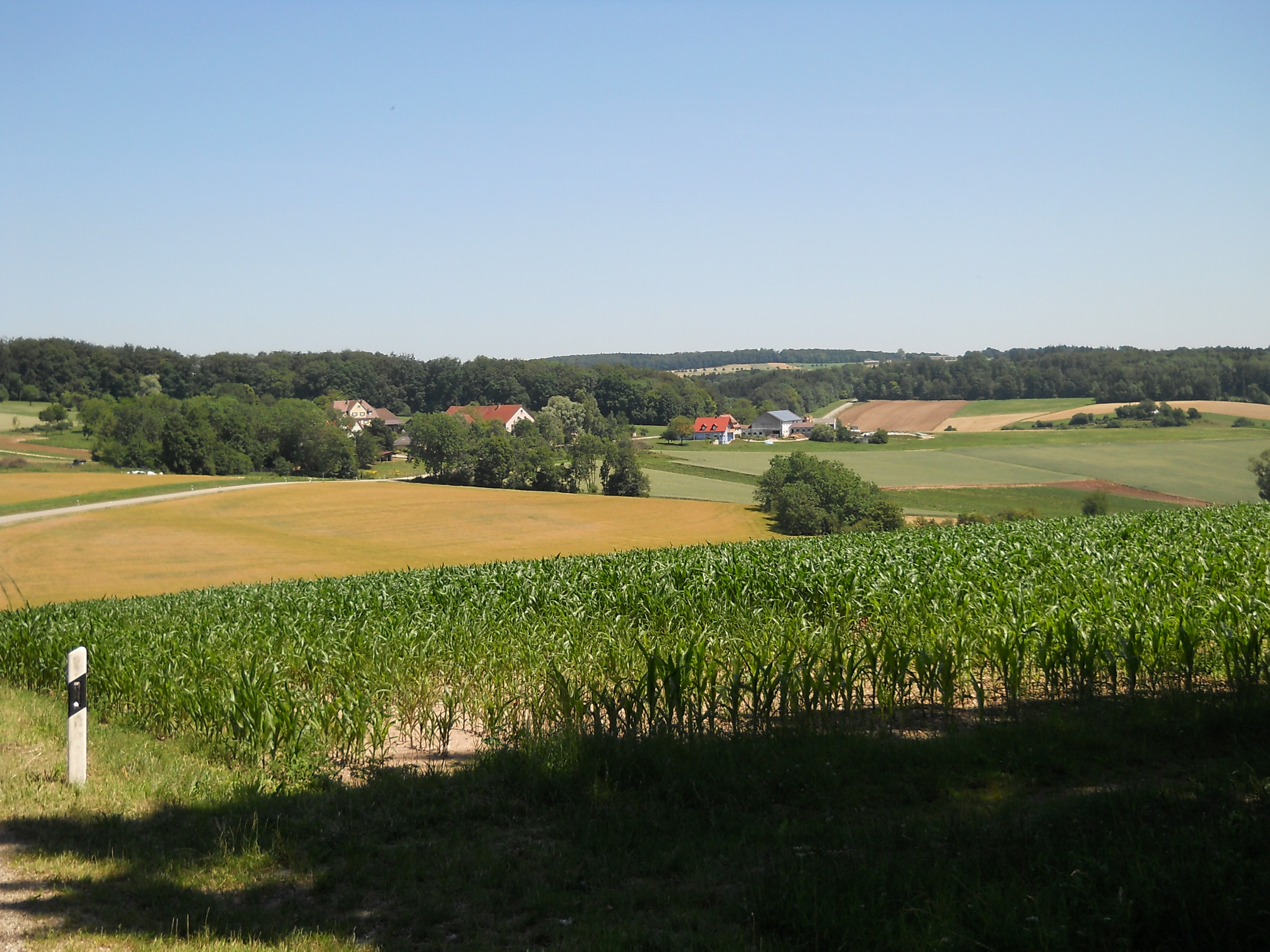 Wieshof, Ortsteil von Treuchtlingen im mittelfränkischen Landkreis Weißenburg-Gunzenhausen (Bayern)